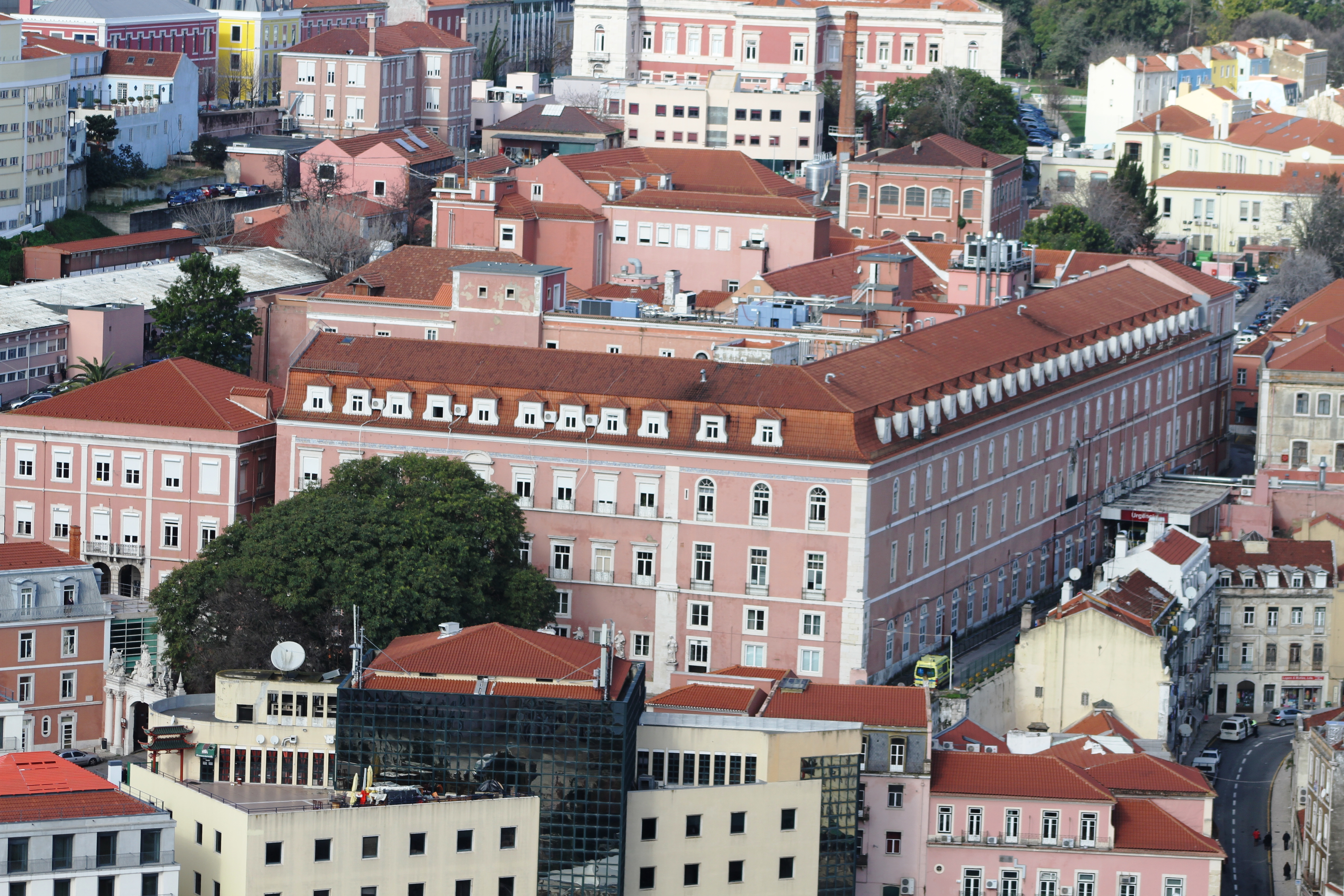 Vista de Lisboa a partir do Castelo de São Jorge - Hospital São José